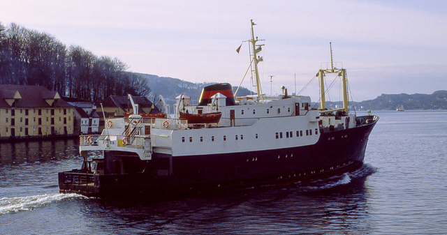 MS Firda passerer Skoltegrunnskaien i Bergen i 1988.